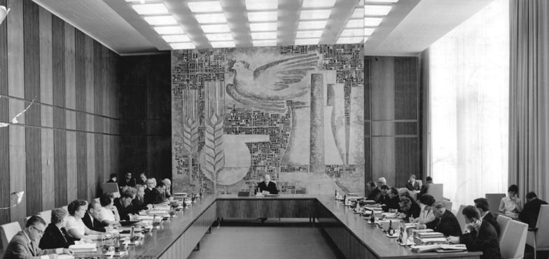 Zentralbild Kohls 14.7.1967 Berlin: Konstituierende Sitzung des Staatsrates der DDR am 13.7.1967 Auf dem Foto (Mitte) Walter Ulbricht, Vorsitzender des Staatsrates der DDR, linke Seite (von rechts nach links): Dr. Heirich Homann, Otto Gotsche (halb verdeckt), Willi Stoph, Hans Rietz, Günter Mittag, Friedrich Ebert (halb verdeckt), Prof. Dr.-Ing. habil. Liselotte Herforth, Paul Strauß, Else Merke, Horst Schuhmann, Anni Neumann, Marie Schneider, Generalstaatsanwalt Josef Streit, rechte Seite (von links nach rechts): Gerals Götting, Prof. Dr. h.c. Johannes Dieckmann, Dr. Manfred Gerlach, Prof. Dr. h.c. Erich Gerrens (völlig verdeckt), Klaus Sorgenicht, Prof. Hans Redenberg, Erich Grützner, Brunhilde Hanke, Karl Ricke, Friedrich Kind, Hans Heinrich Simon. (zweiteiliges Panorama)